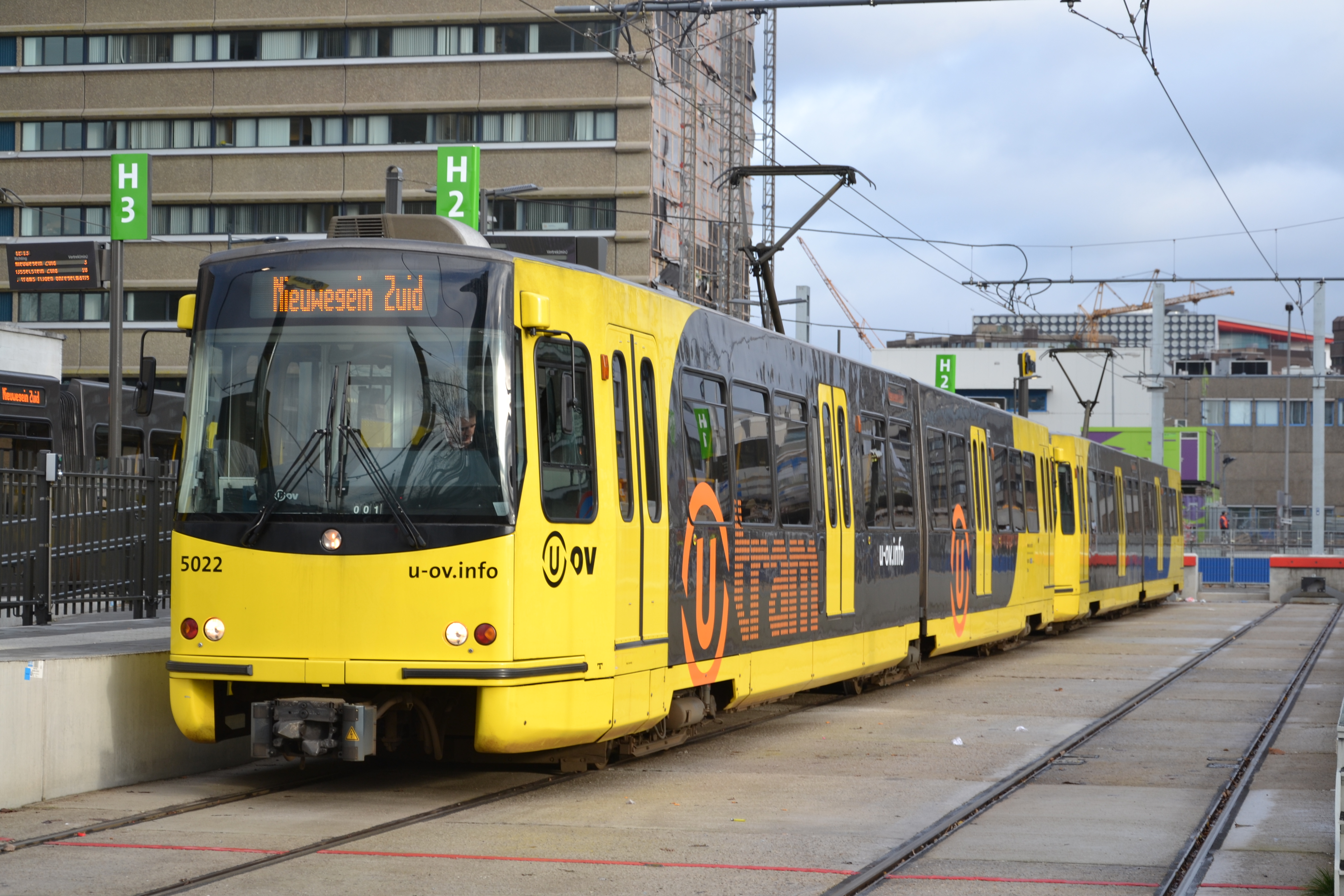 De komst van Qbuzz als vervoerder in het BRU bracht ook een nieuwe huisstijl voor de sneltram: U-tram